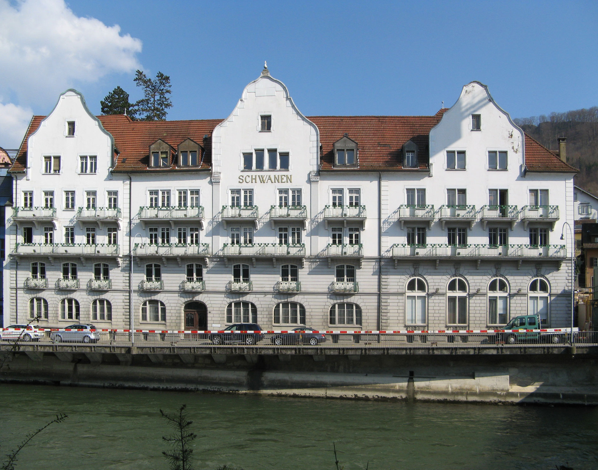 Hotel "Schwanen" im Bäderquartier von Ennetbaden, vom Mercier-Steg aus gesehen